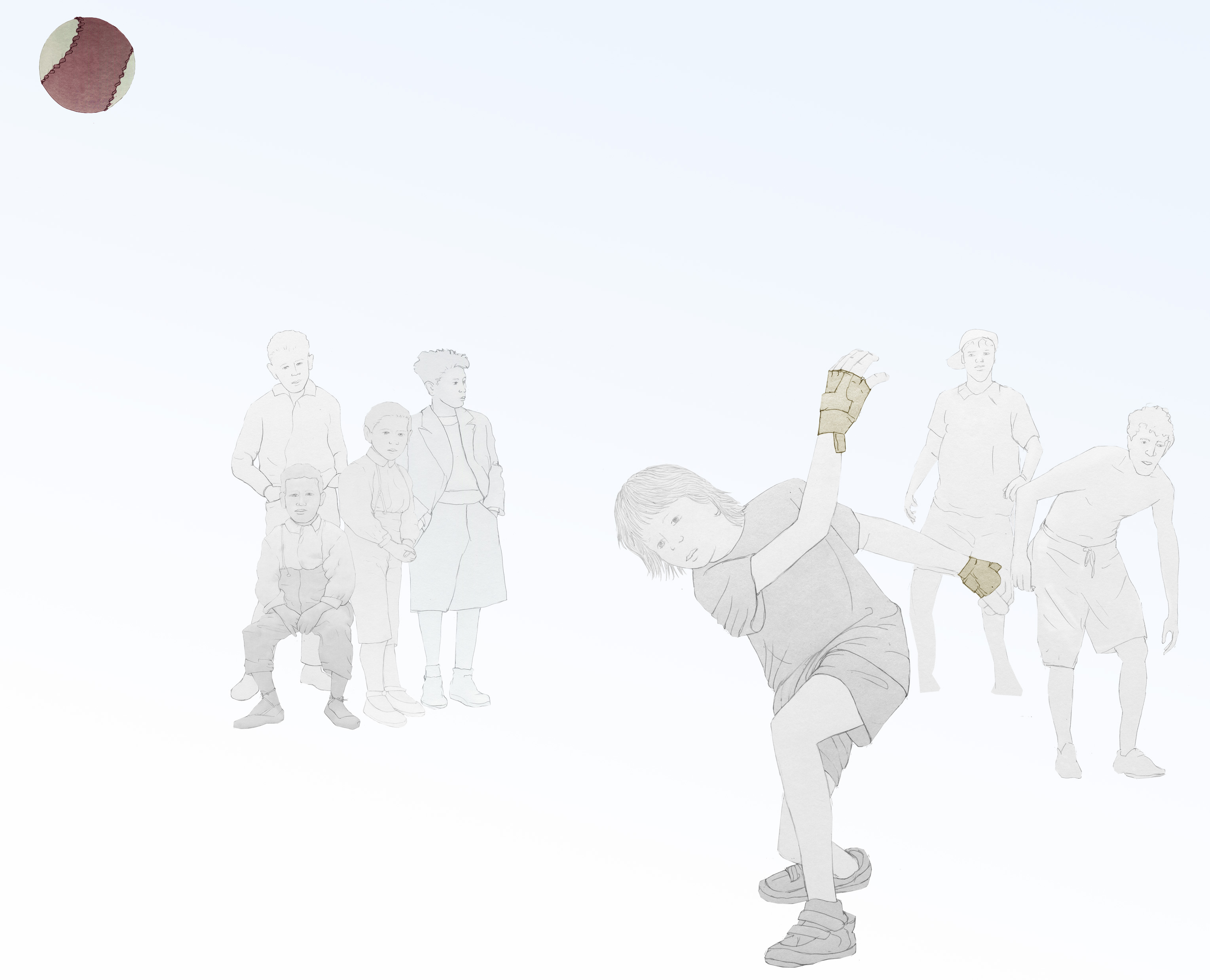 El joc a les societats rurals. La imatge busca il·lustrar el procés de joc, tant la creació de regles com la cerca de materials per a crear joguets. Cada imatge il·lustra diferents activitats que a dia de hui serien considerades perilloses o inapropiades. Autor de la il·lustració: Andrés Marín Jarque